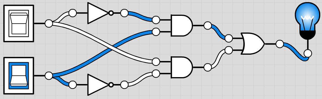 Cicuito simples original.JPG